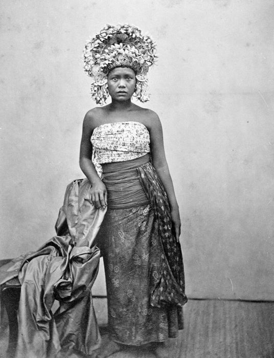 Foto. Een danseres uit Bali.